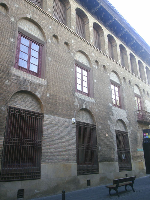 Cuartel general de Castaños - Palacio del Marqués de San Adrián Palacio de San Adrián Tudela Navarra España autor de la fotografía user:papix